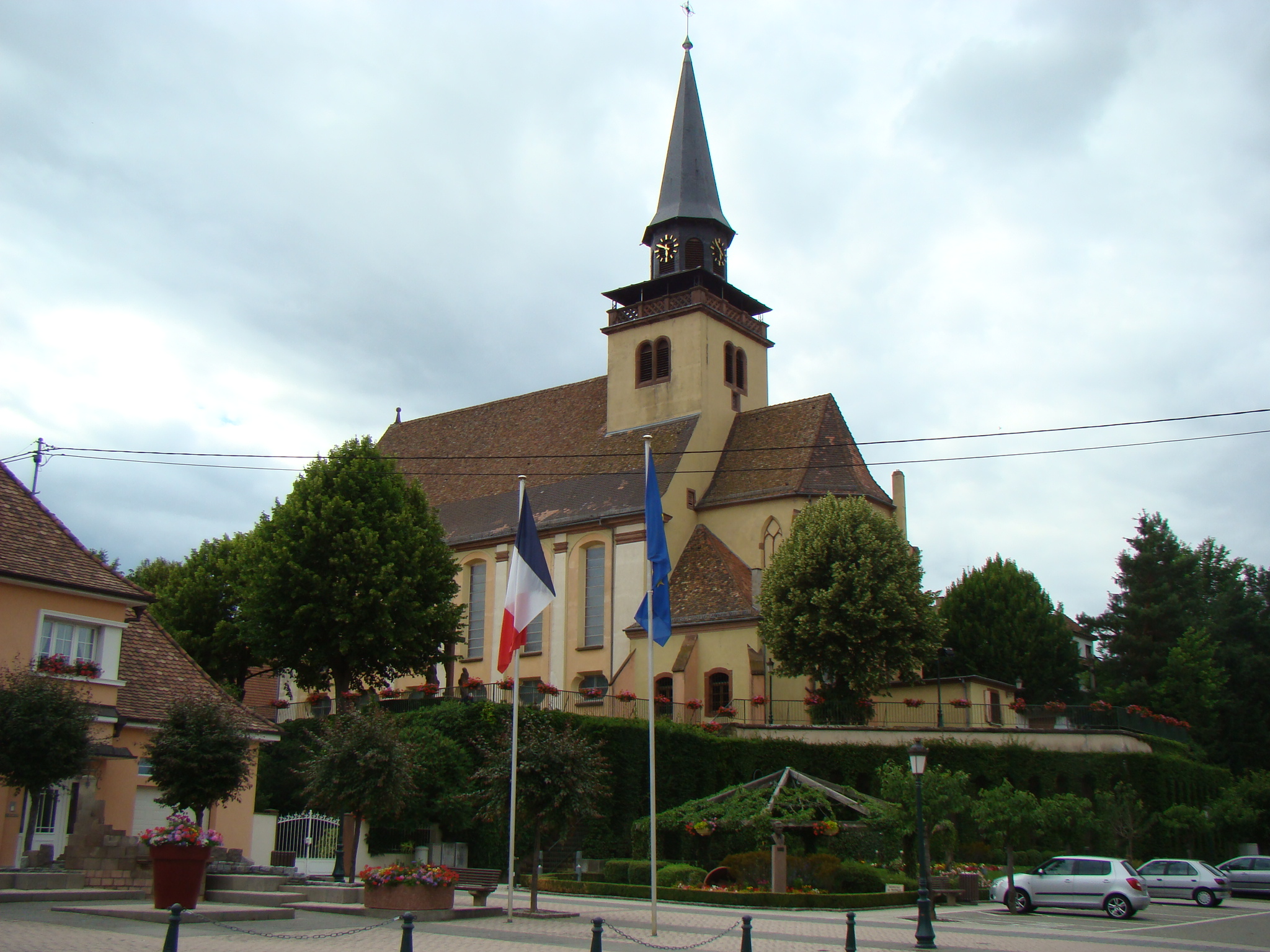 Église de la Sainte-Trinité de Lauterbourg